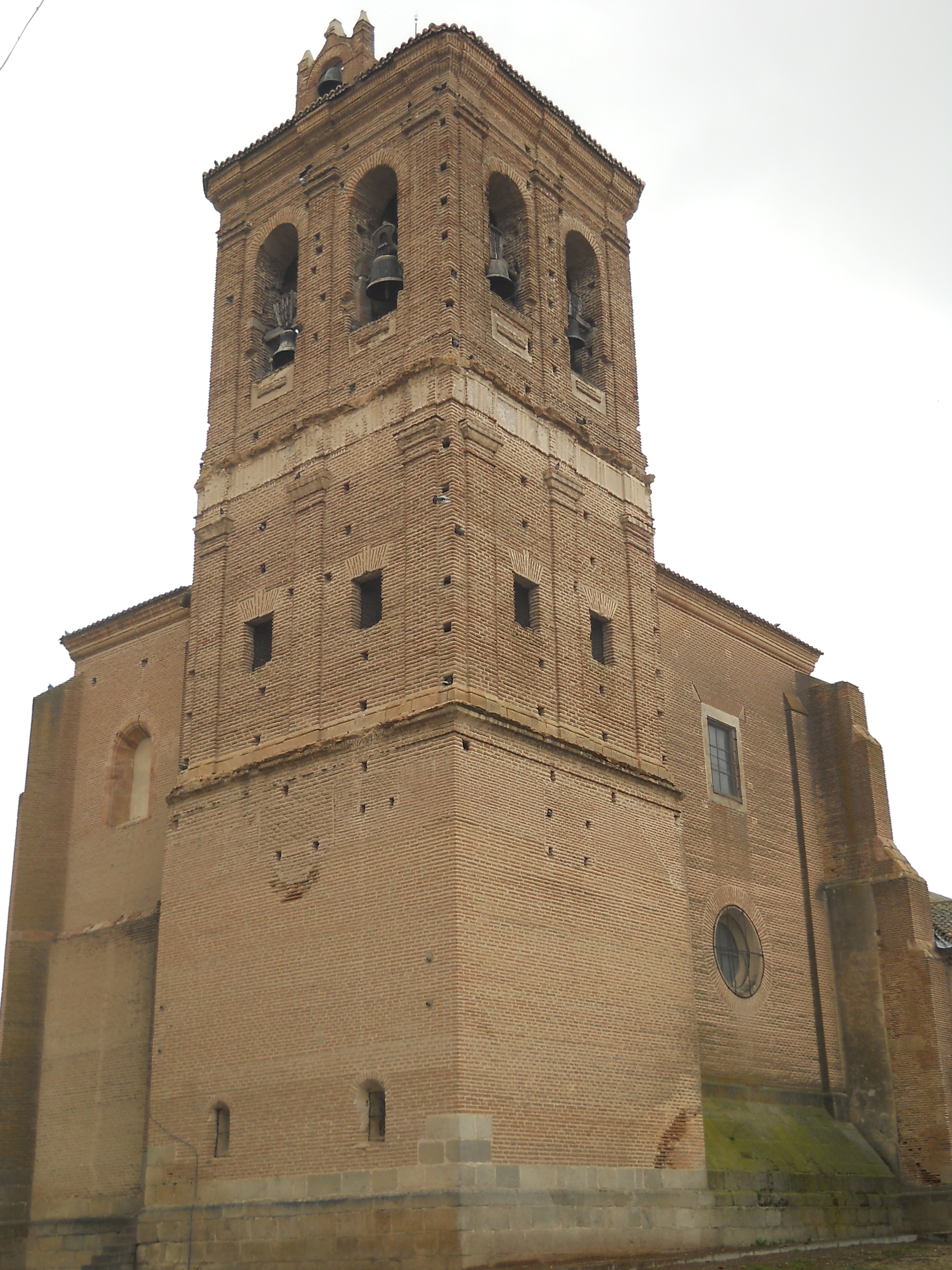 Iglesia de san Cipriano, Fontiveros, Ávila, España